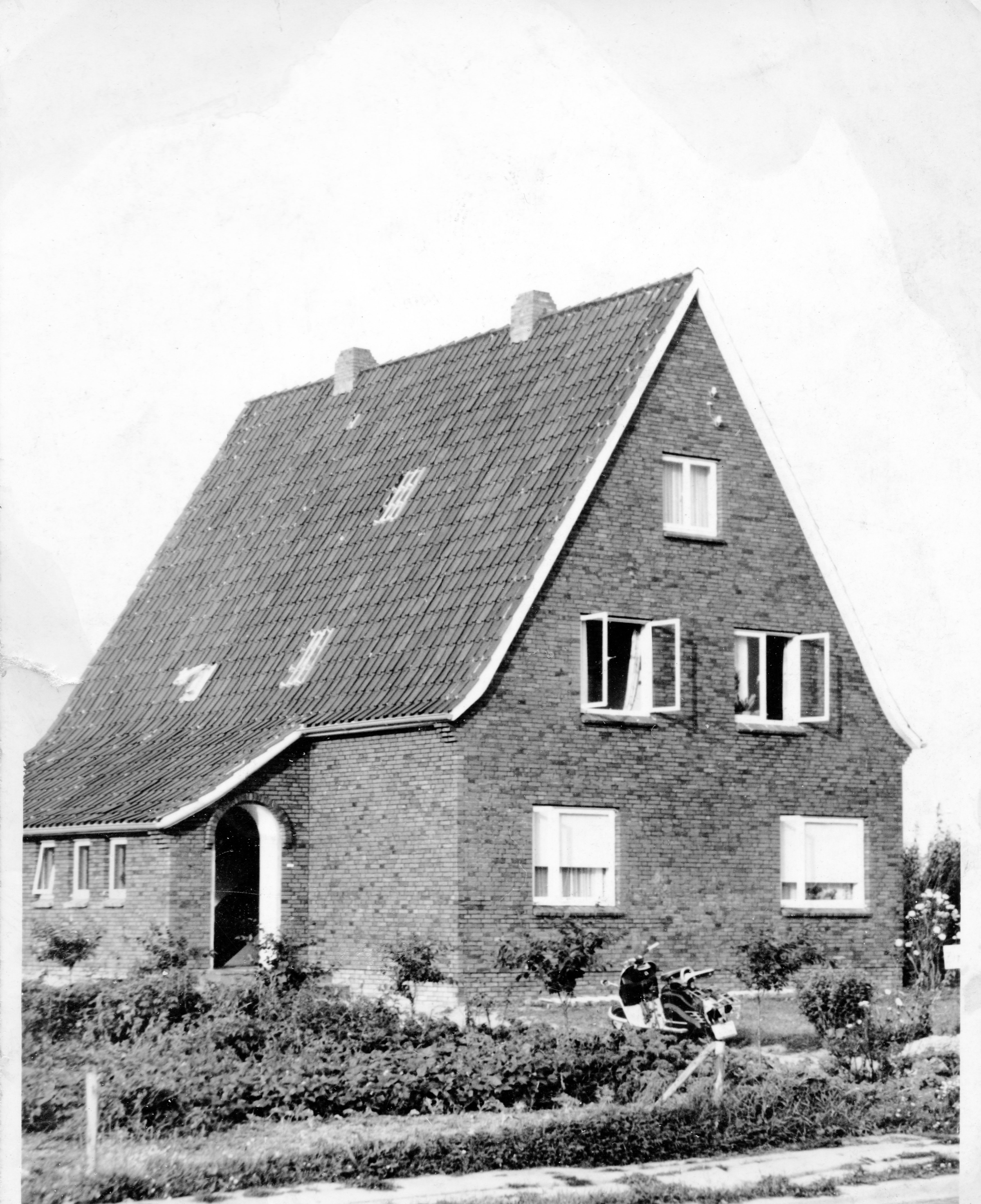 Einfamilienhaus mit Einliegerwohnung, erbaut 1958; Standort: Norden (Ostfriesland), Stadtteil: Neustadt